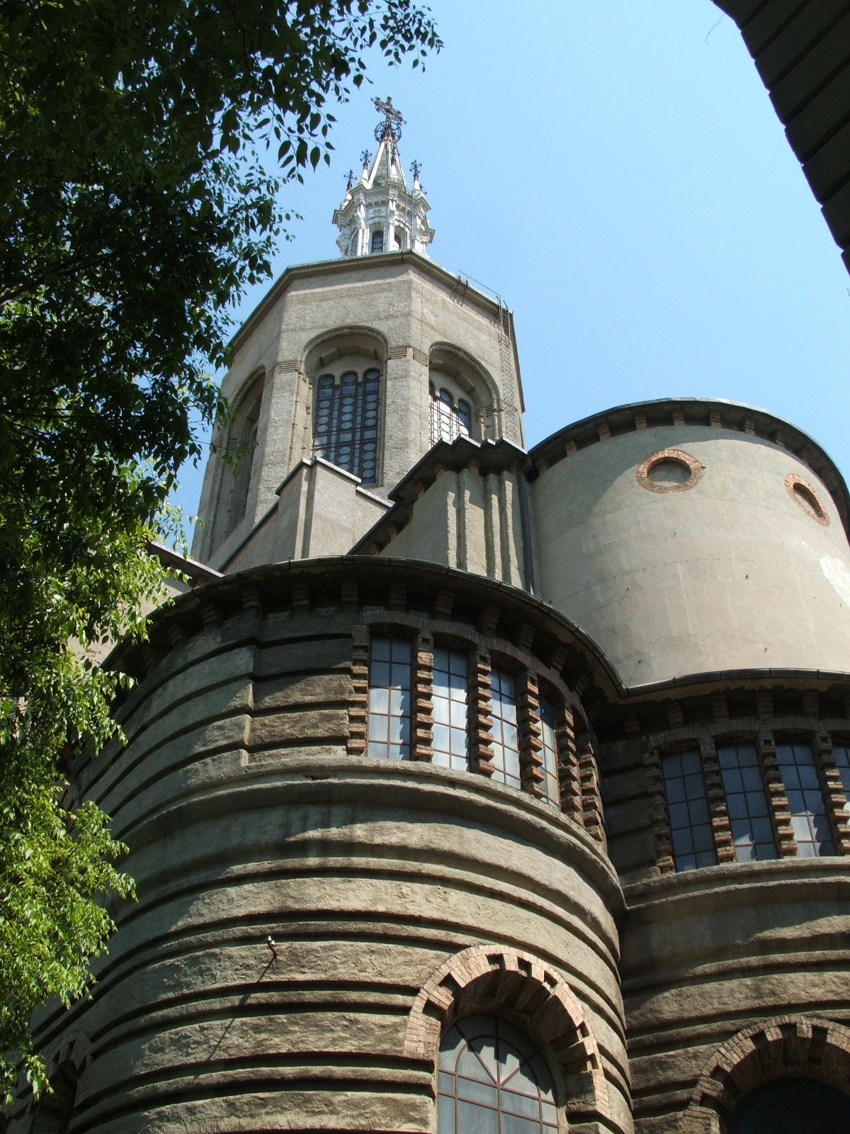 Genova, quartiere di Carignano, chiesa del Sacro Cuore